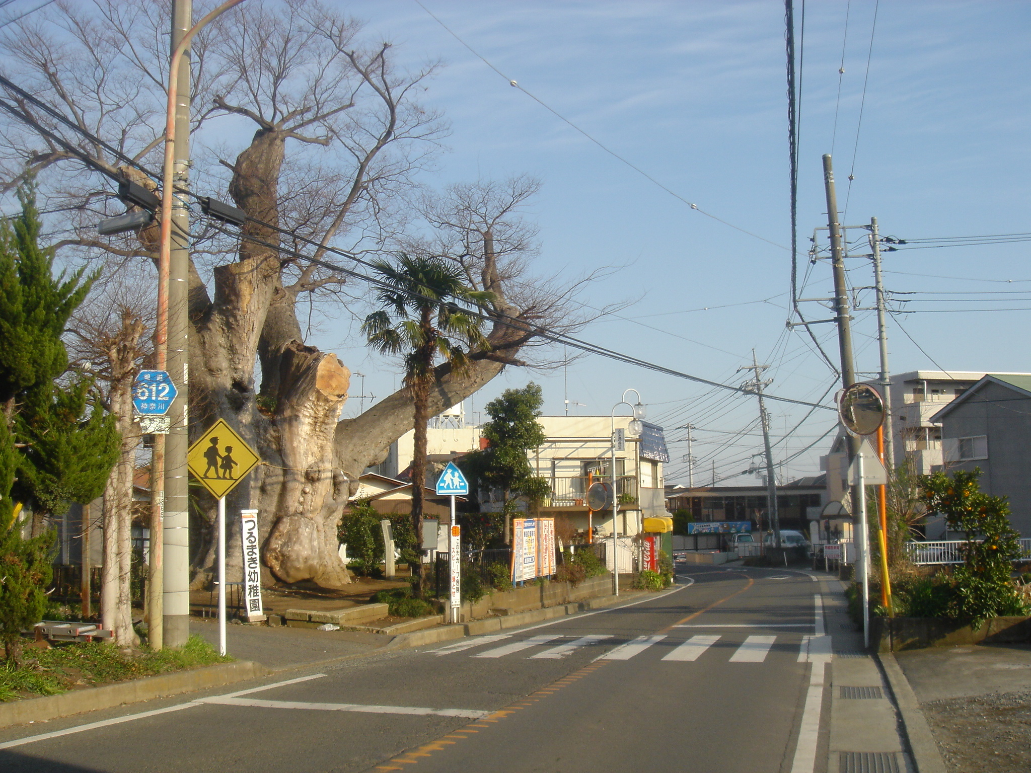 r 612